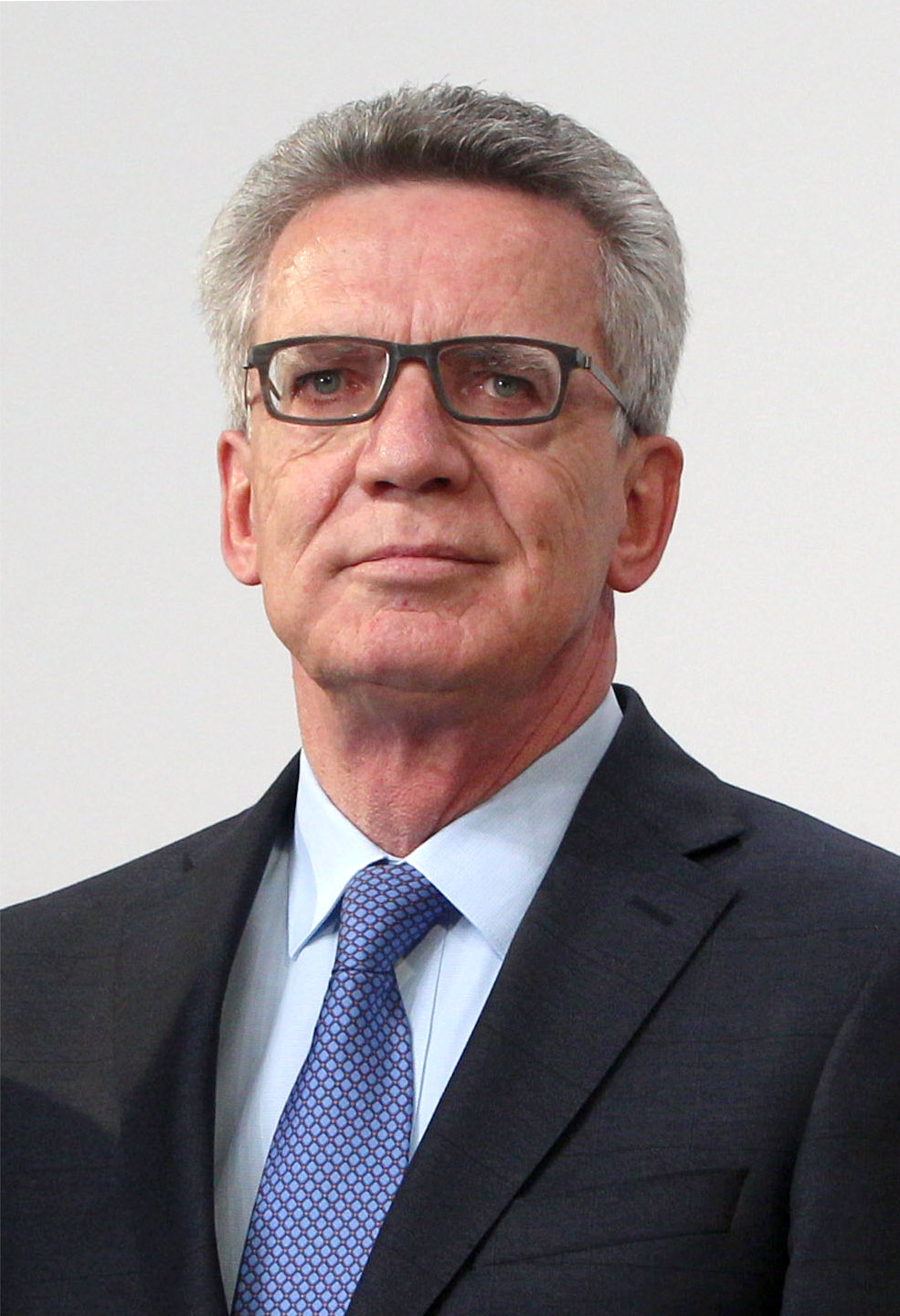 Bundesinnenminister Thomas de Maizière auf der Wahlparty der CDU zur Bundestagswahl 2017 im Konrad-Adenauer-Haus